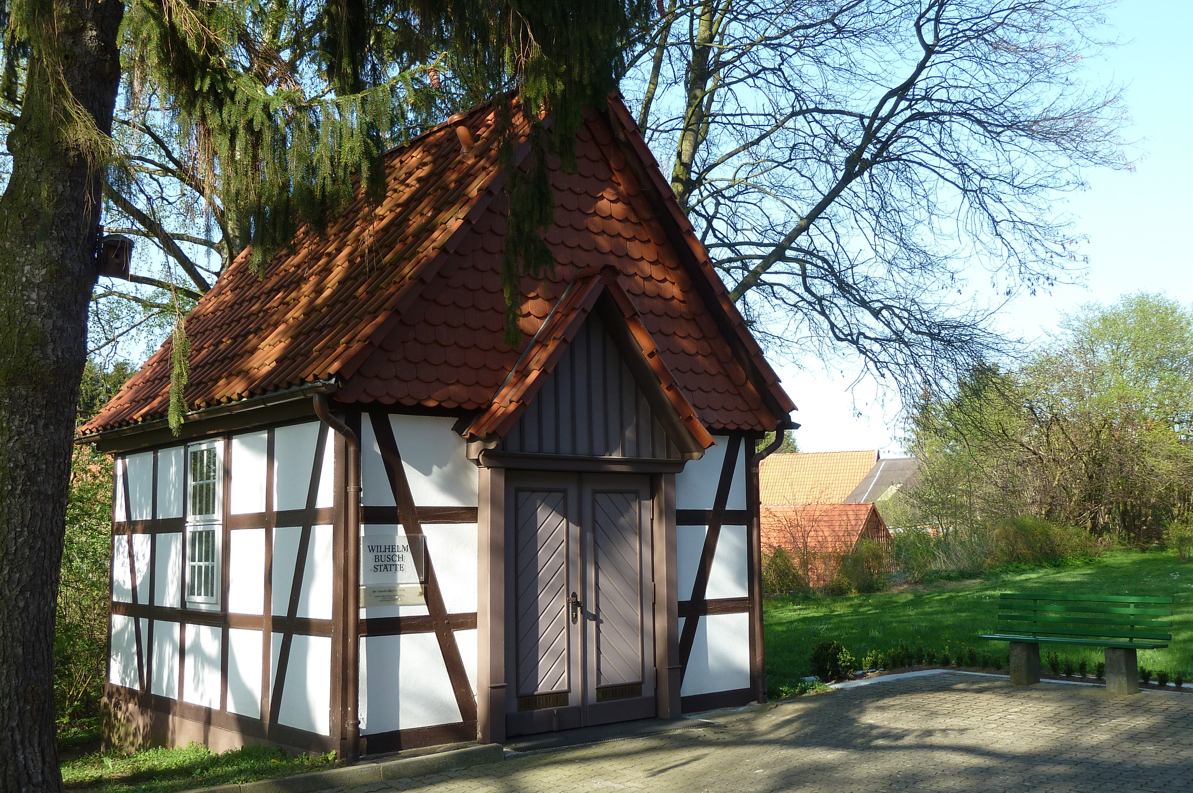 Wilhelm-Busch-Stätte in Hattorf am Harz, Landkreis Osterode, Niedersachsen.